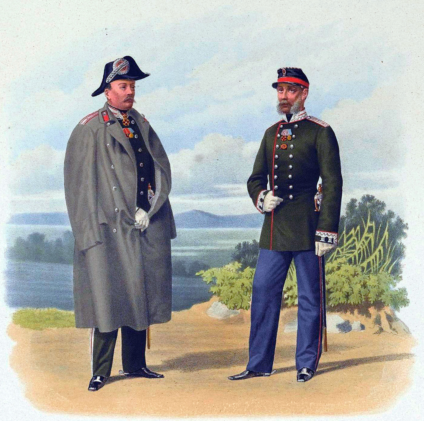 Чиновники Военного министерства 5 и 8 классов. (В парадной форме). 14 Сентября 1863.